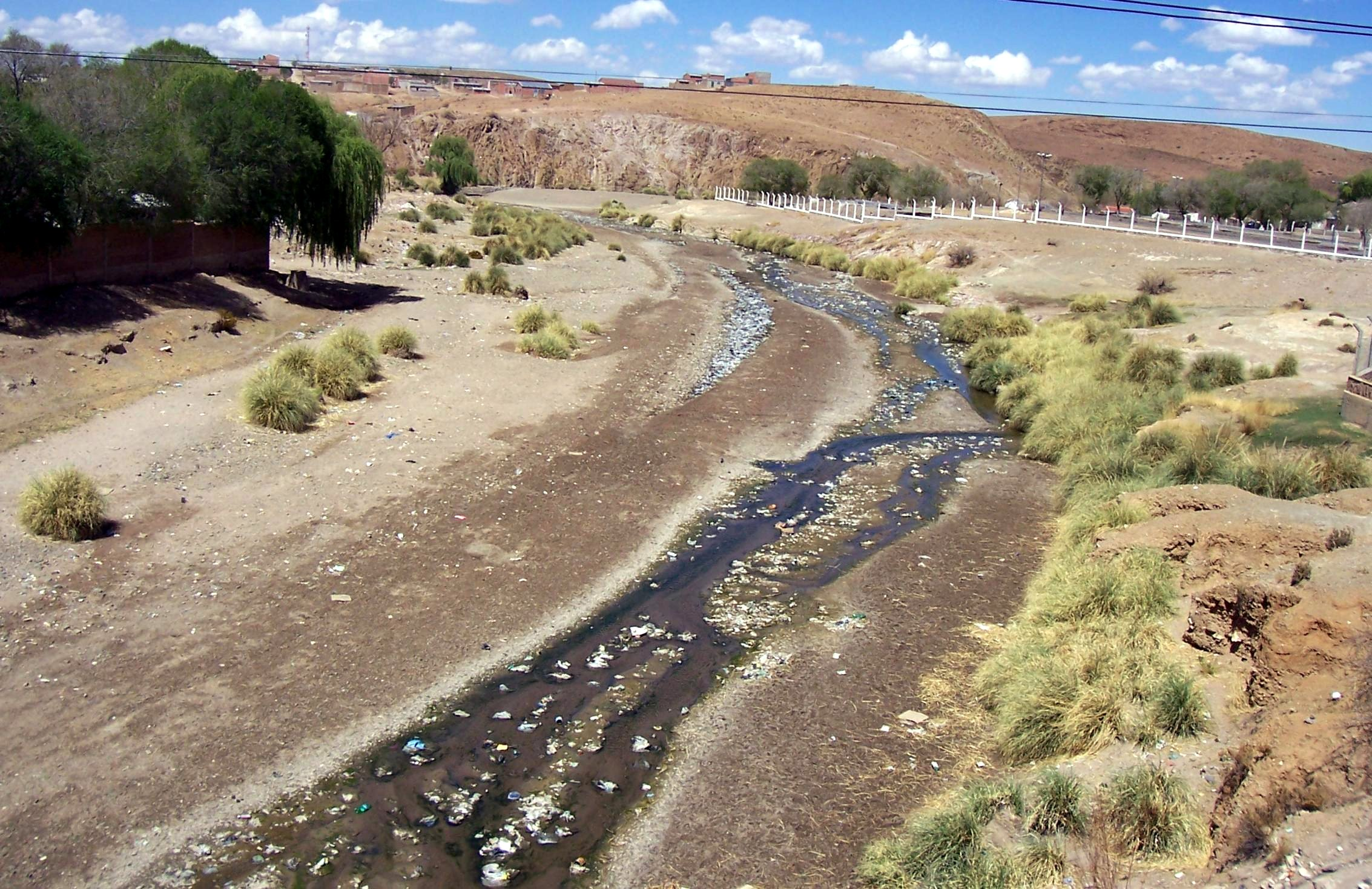 El Río La Quiaca, en la frontera entre Argentina y Bolivia.